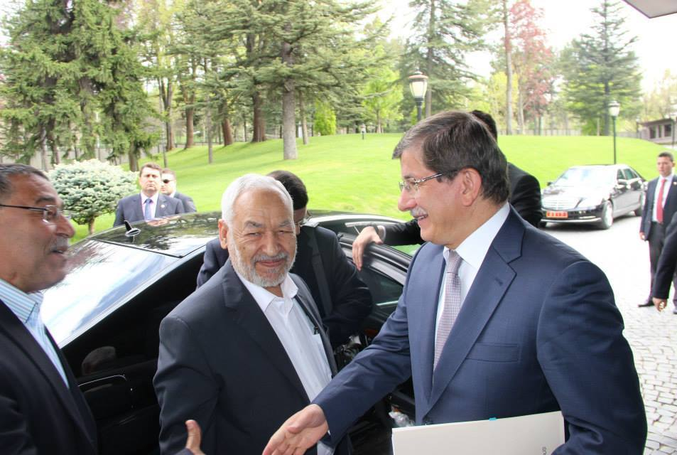 الشيخ راشد في أنقرة لتهنئة السيد رجب طيب أردوغان Visite officielle d'Ennahdha pour rencontrer le président turc Recep Tayyip Erdoğan et le premier ministre turc Ahmet Davutoğlu en 2014. وفد حركة النهضة في أنقرة بتركيا لتهنئة الرئيس التركي رجب طيب أردوغان ورئيس الوزراء التركي أحمد داوود أوغلو بالانتخابات في 2014.